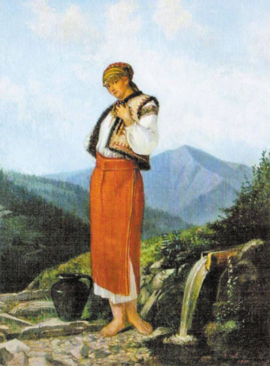 Картина К. Устияновича